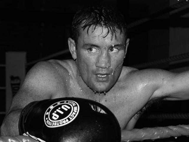 マイケル・ゴメス.